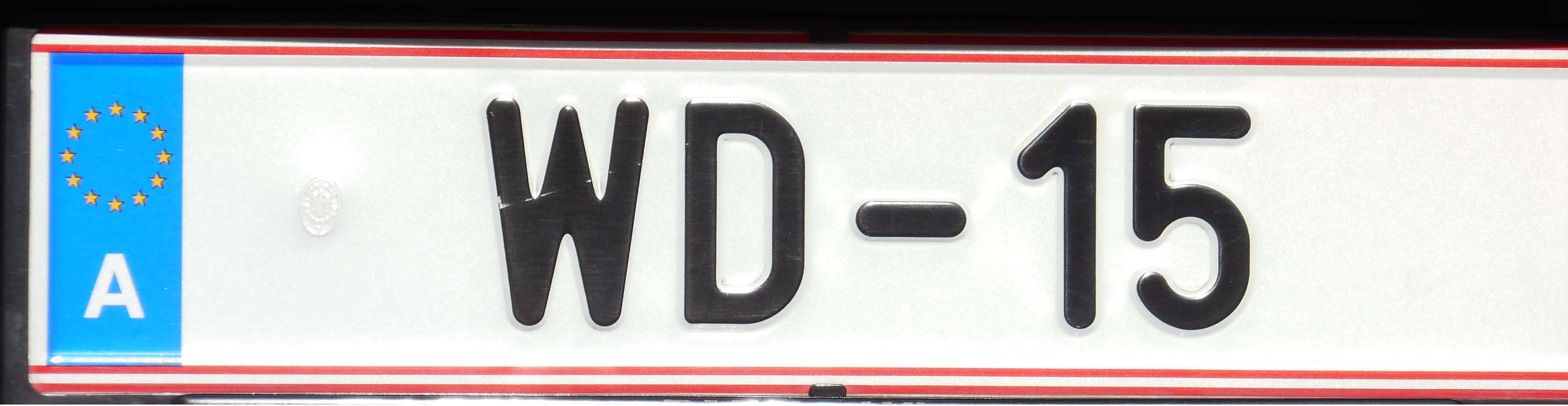 Kfz-Kennzeichen Diplomat aus Wien